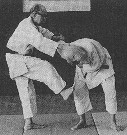 神道楊心流の松岡宗家